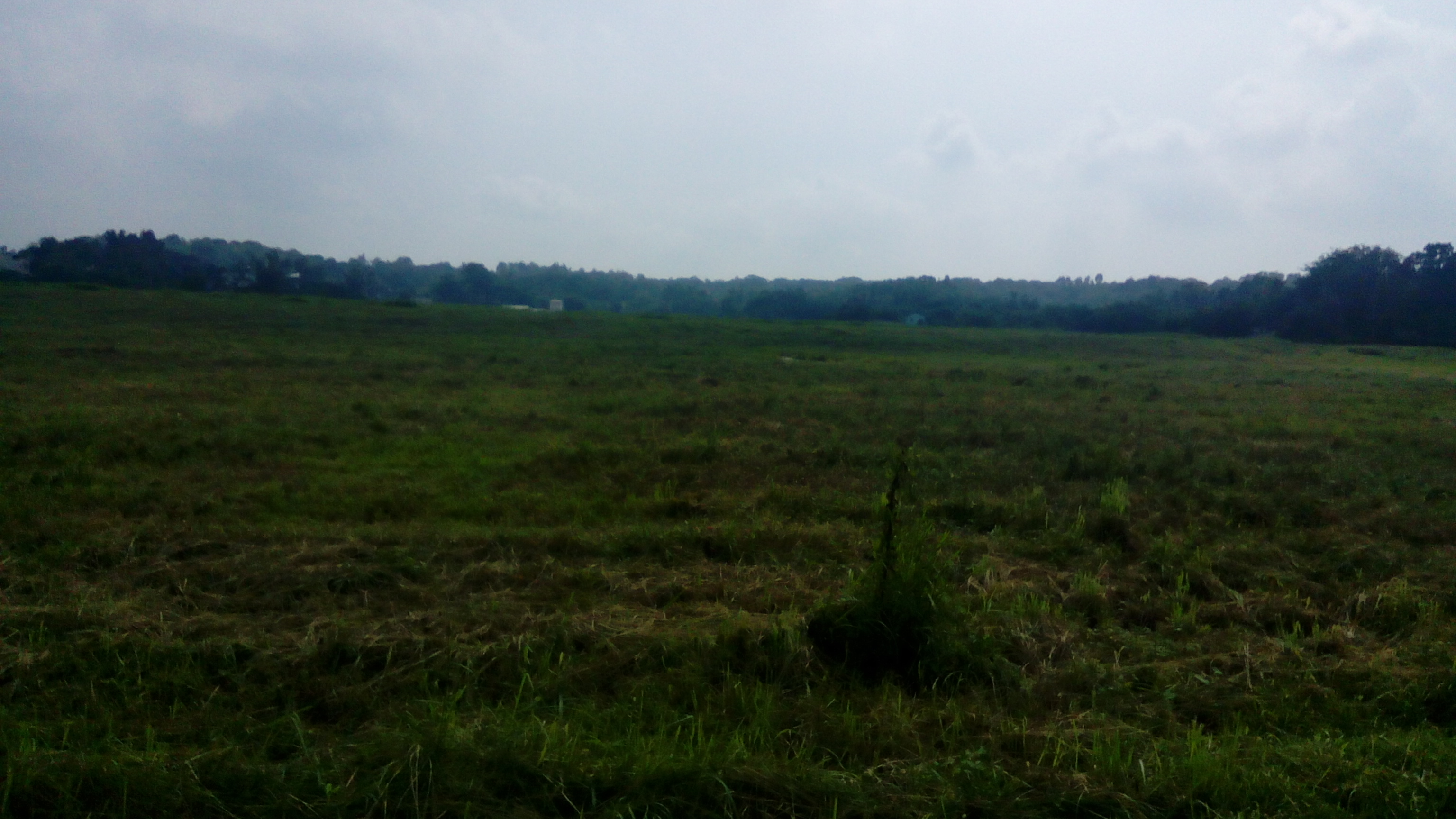 忠義里跟永芳里之間 鳳林四路旁